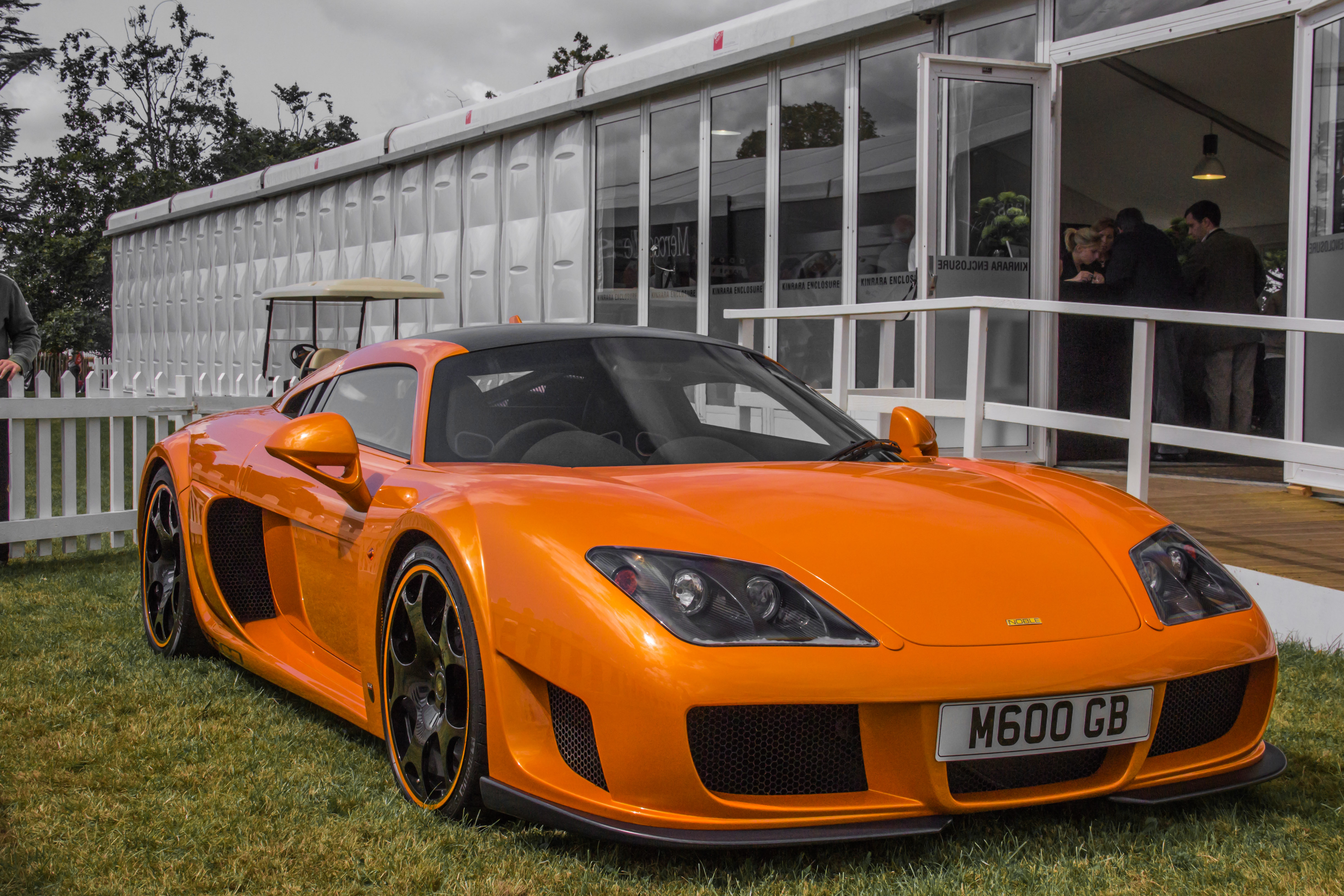 Noble M600